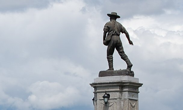 Statue du semeur de Grande-Anse